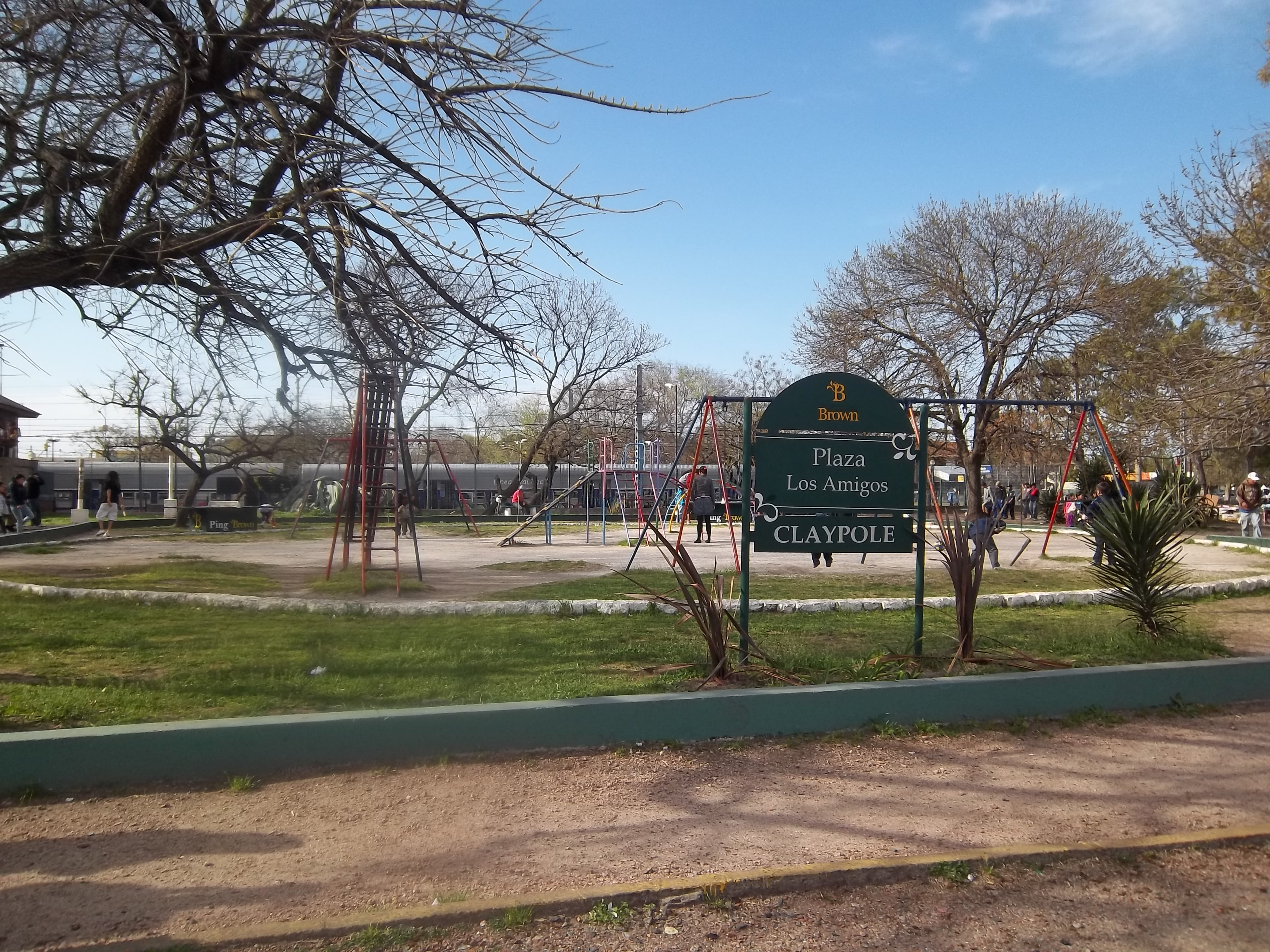 Plaza Los Amigos junto a la estación ferroviaria en Claypole, partido de Almirante Brown, provincia de Buenos Aires, Argentina.